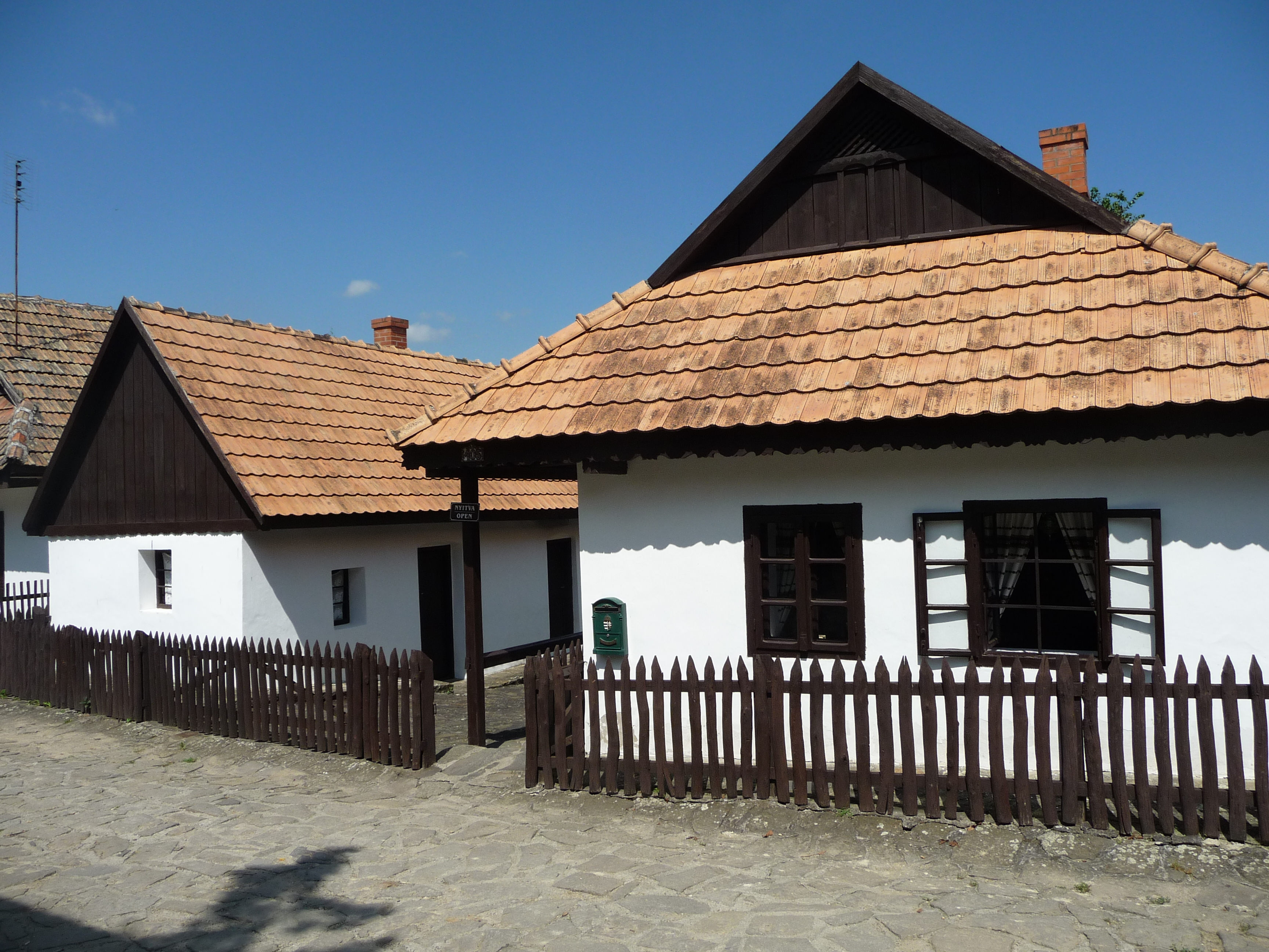 Hollókő, Kossuth u. 105.